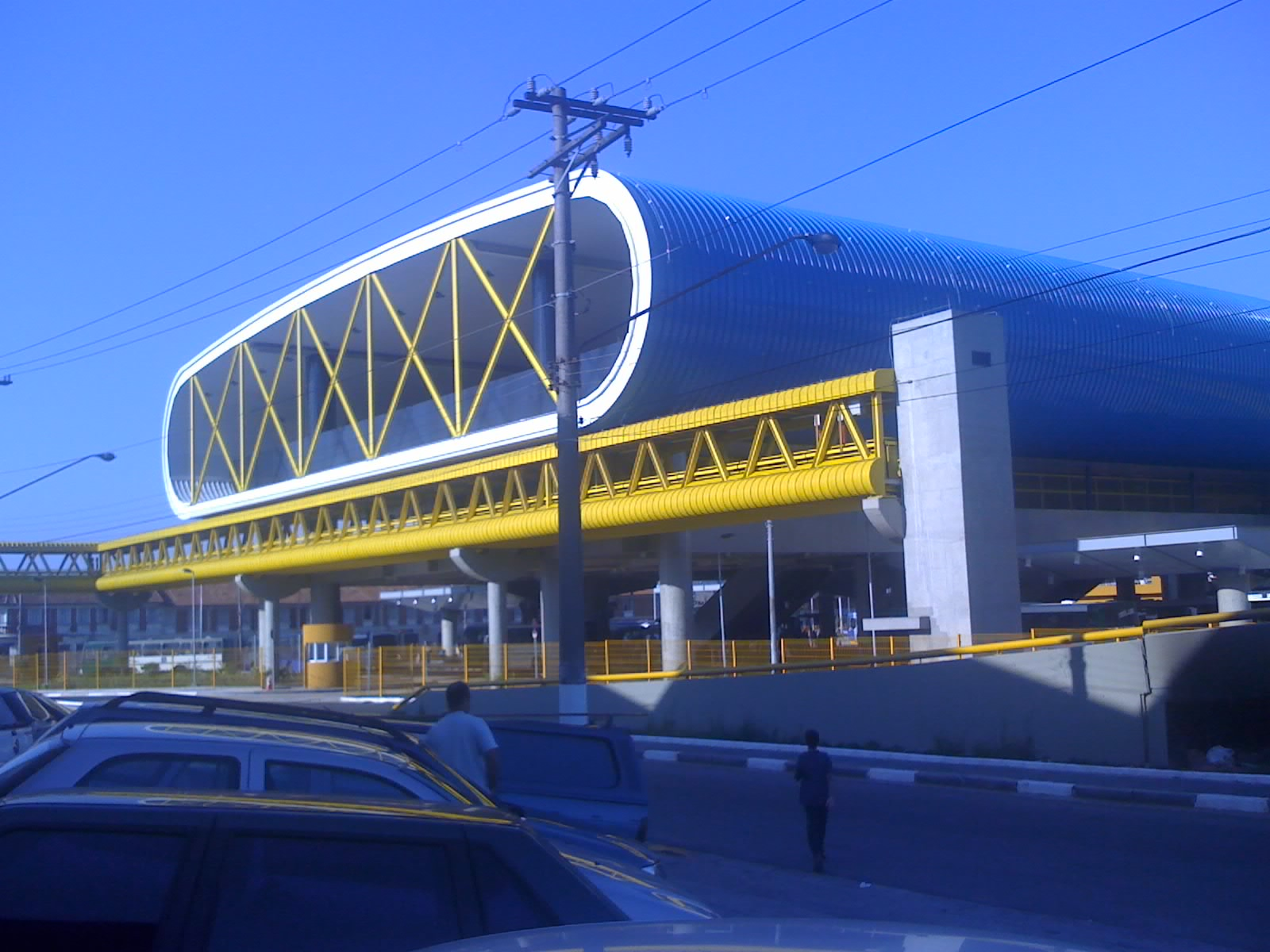 Expresso Tiradentes - Terminal Sacomã